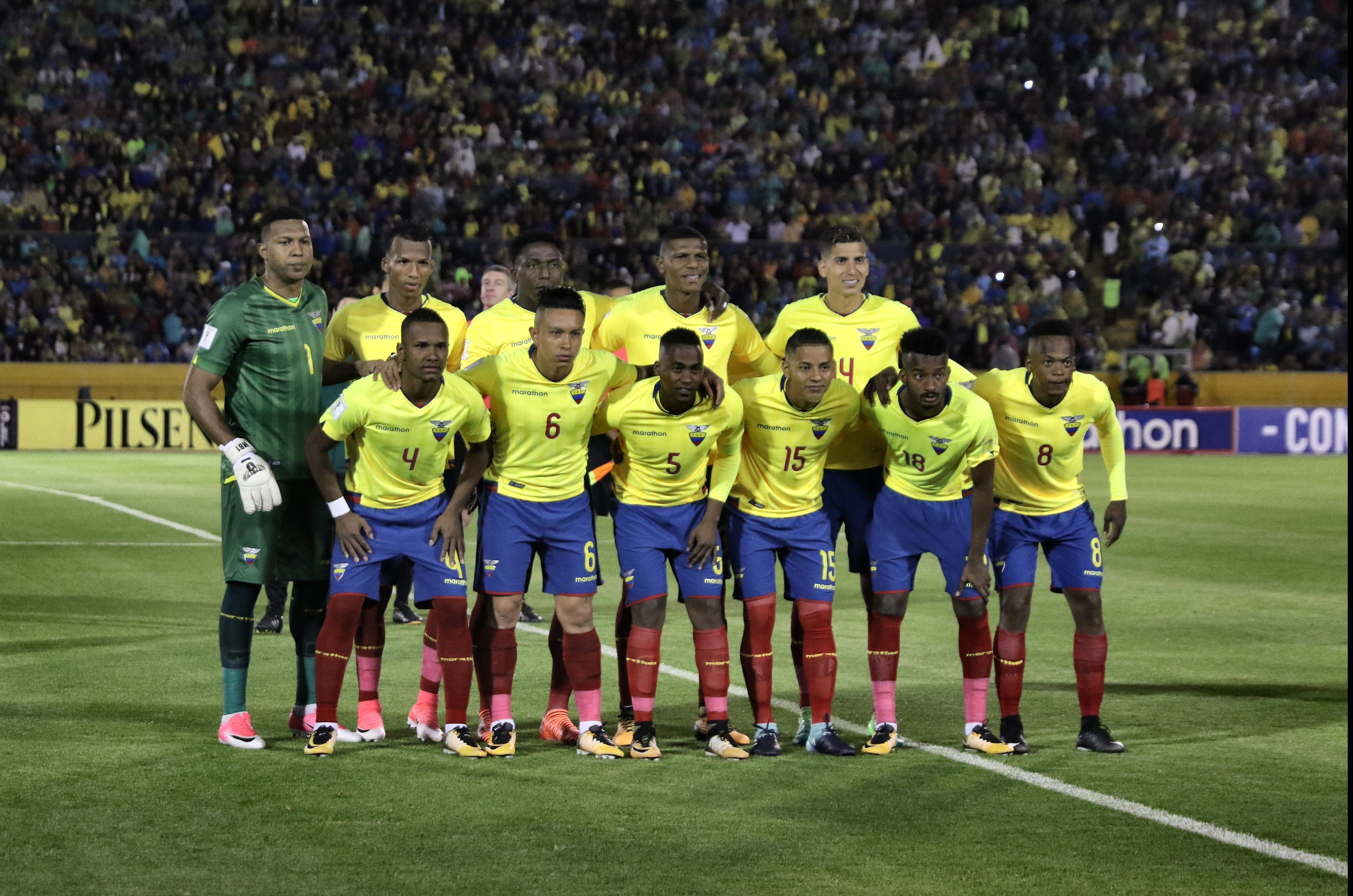 Quito, 10 oct (Andes).- Con tres tantos Argentina espantó los fantasmas de la eliminación, clasificó a su décima octava Copa del Mundo y venció 3-1 a un Ecuador que inició ganando el compromiso, disputado en el estadio Atahualpa de Quito, pero que no supo contener a uno de los mejores jugadores del mundo. ANDES/Micaela Ayala V.